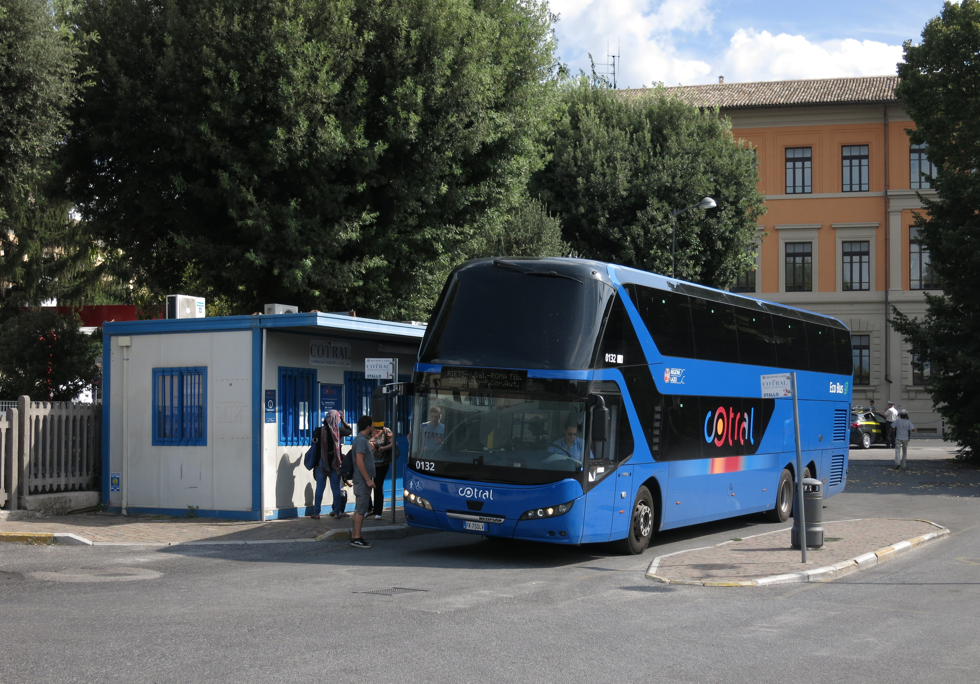 Autobus a due piani Neoplan Skyliner della Cotral (matricola 0132) in servizio sulla linea Rieti-Roma Tiburtina, fotografato all'autostazione di Rieti